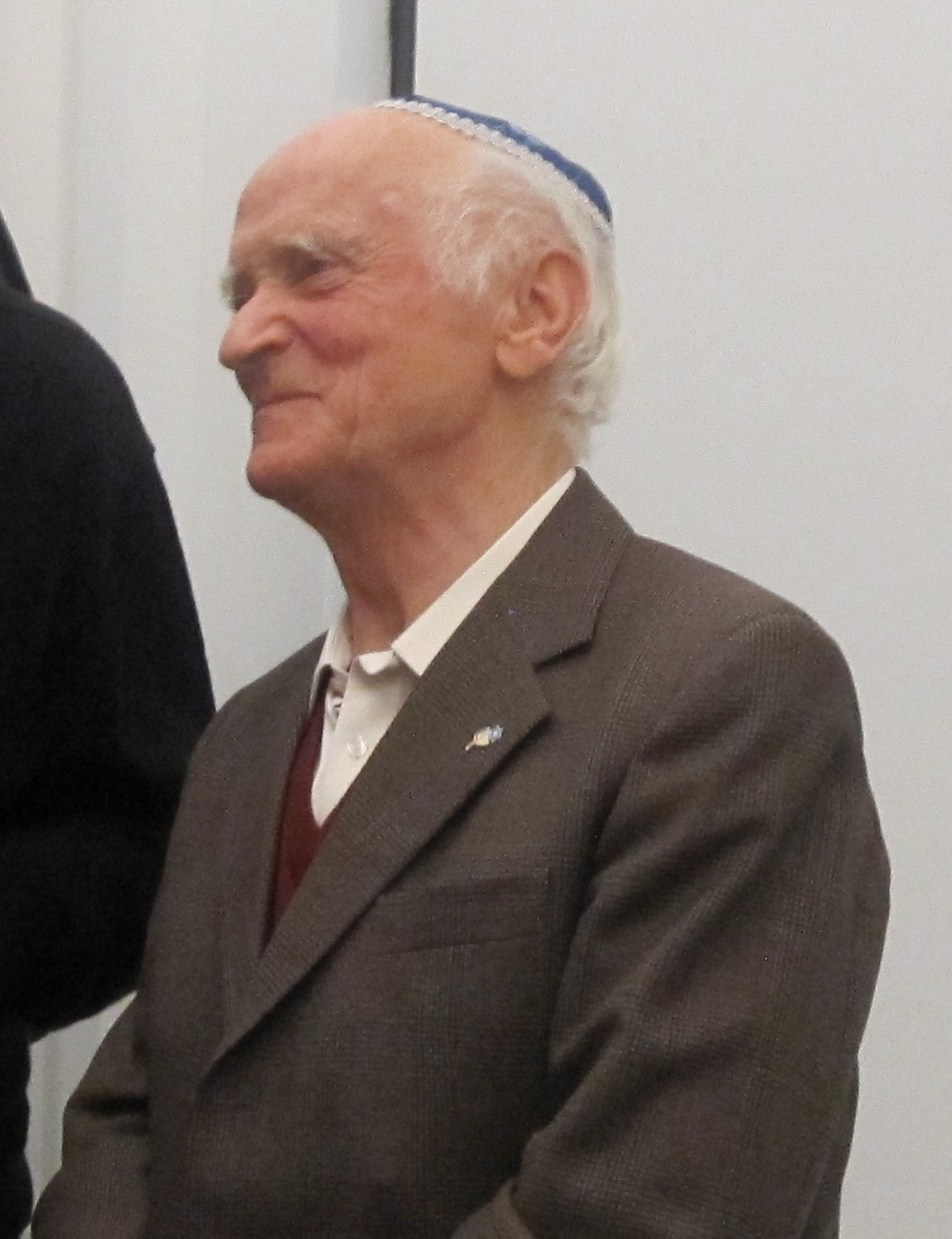 Der Speyerer Fachbuchautor Johannes Bruno freut sich über die Einweihung der Speyerer Synagoge Beith-Schalom, bei der er Ehrengast war.